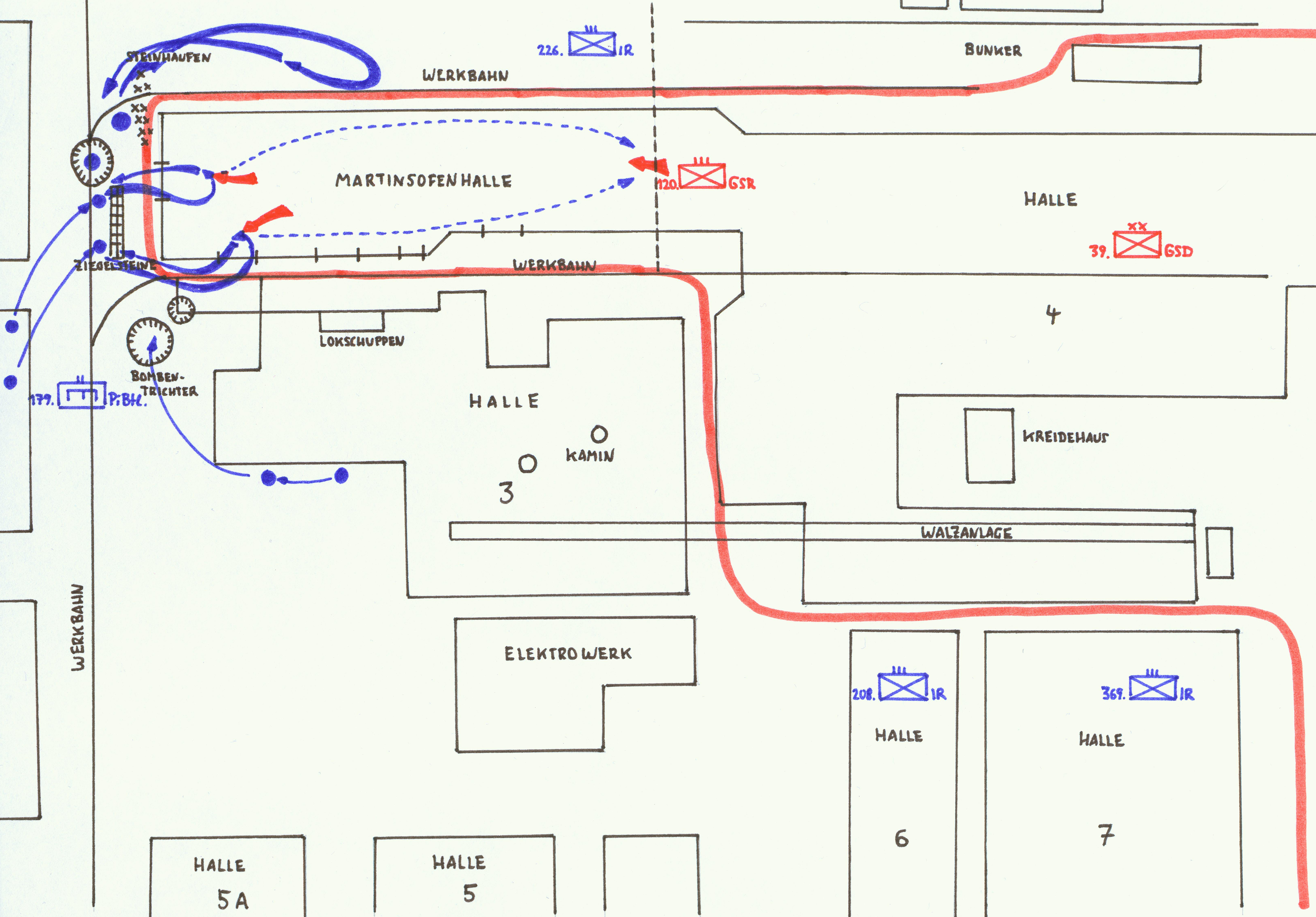 Stalingrad Martinsofenhalle - Gefechtsskizze nach Welz